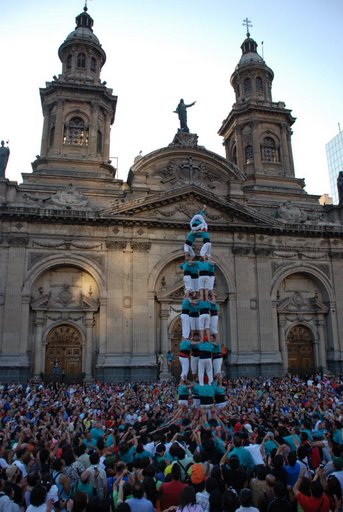 Viatge dels Castellers de Vilafranca a Xile (2008)